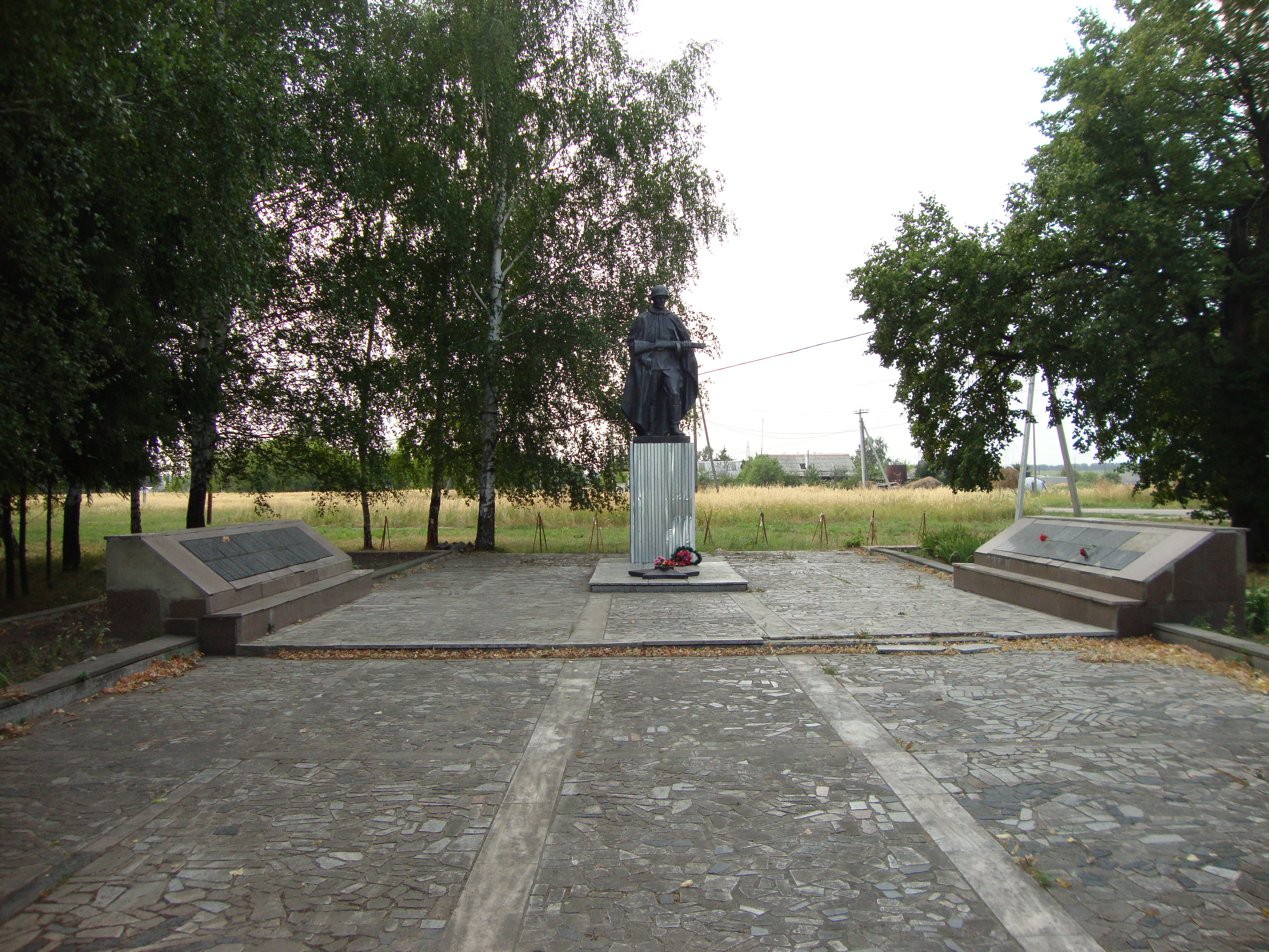 Рязанская область. Памятник неизвестному солдату, вечный огонь (не функционирует) и списки земляков, погибших в годы войны.